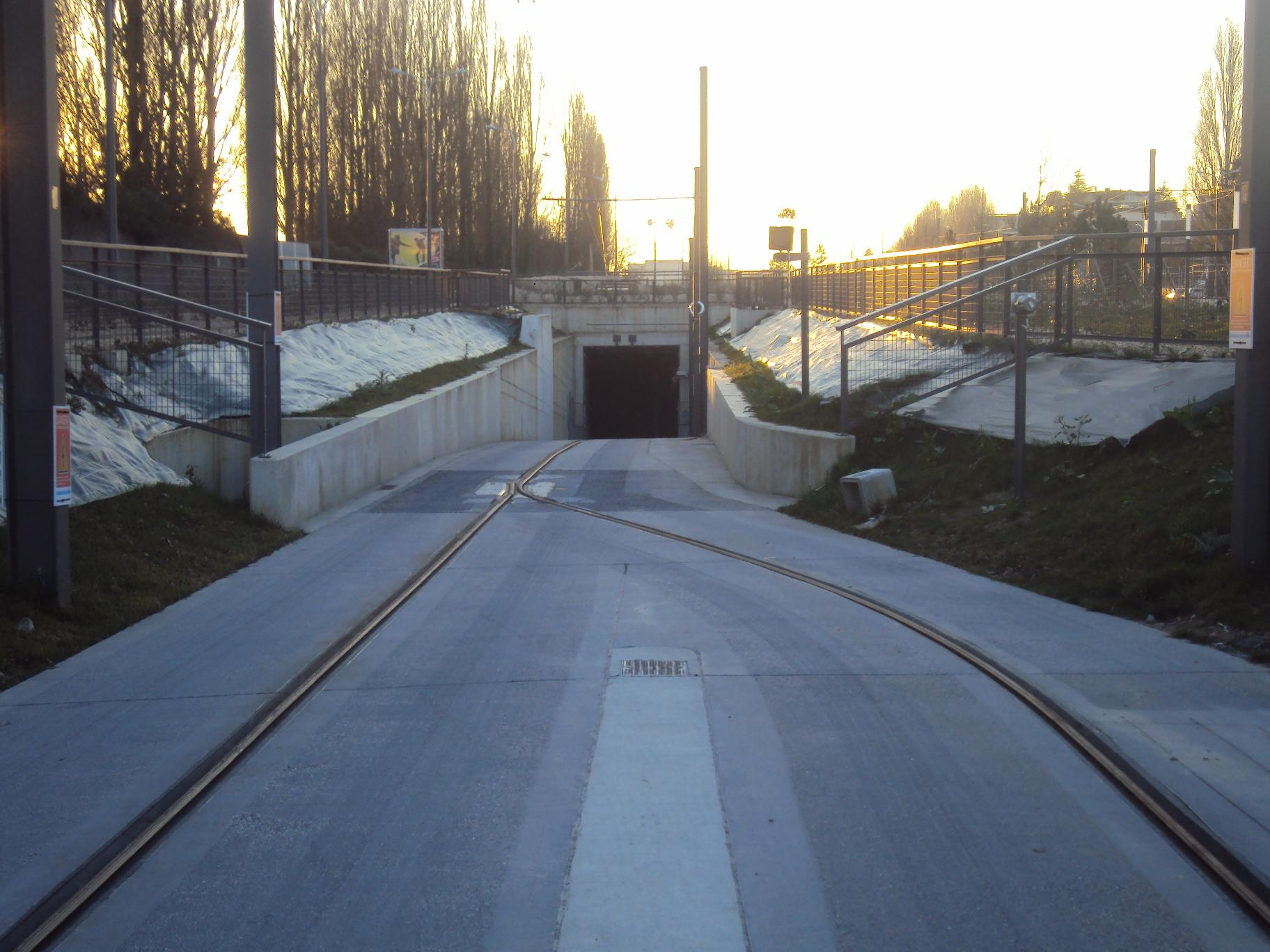 Travaux du T6 Vélizy